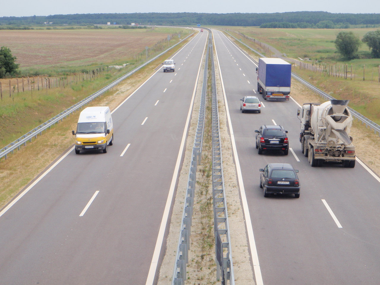 M86 Steinemangerer Schnellstrasse - Vát